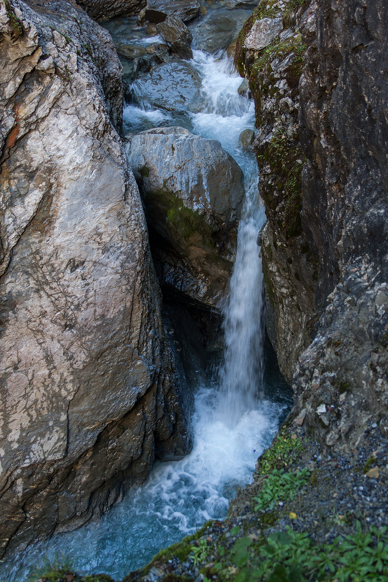 Rosenlauischlucht